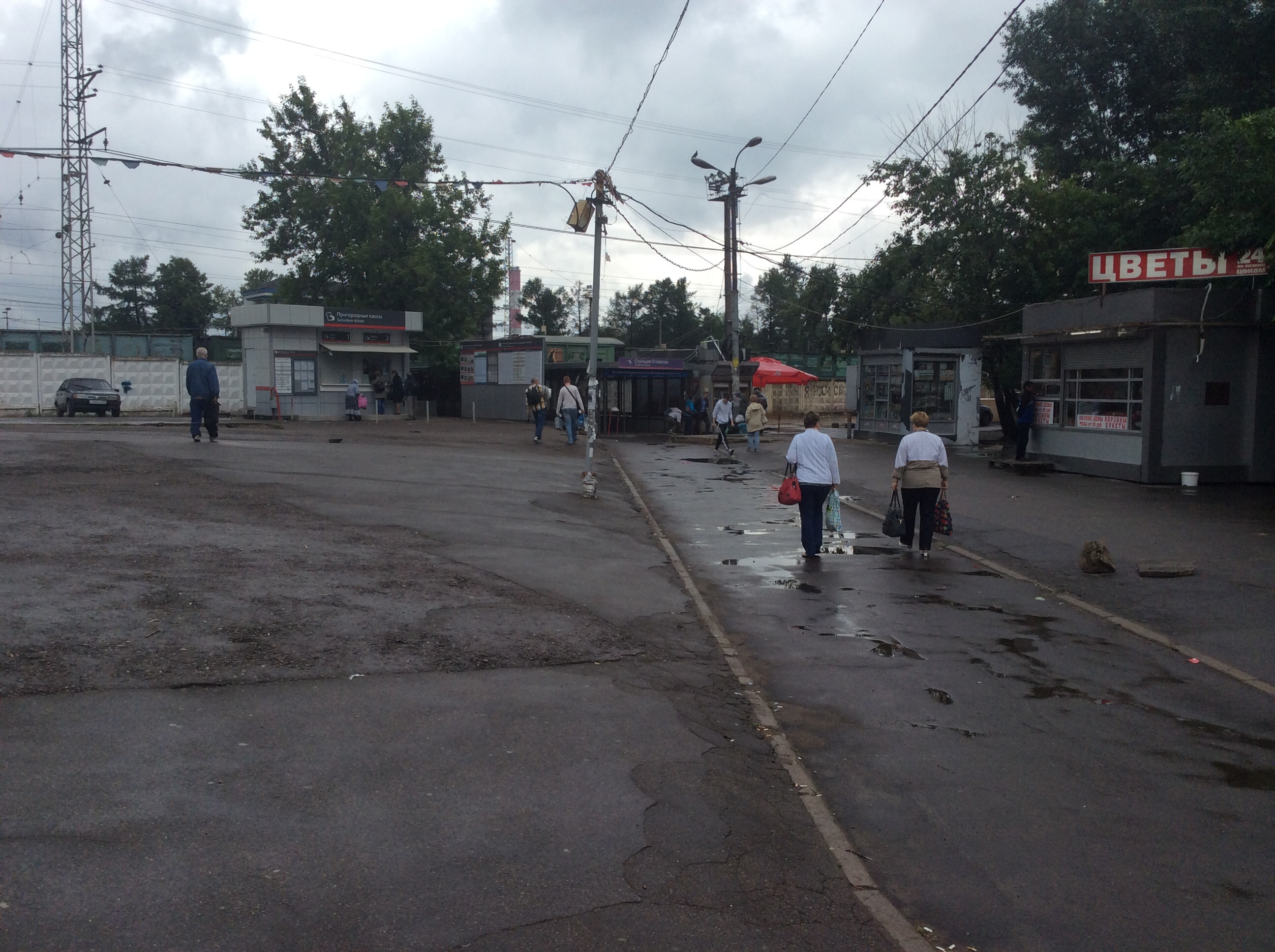 Улица Пржевальского. Станция "Очаково".